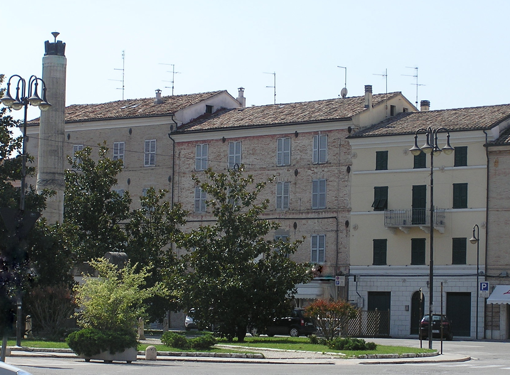 La foto rappresenta piazza Mazzini di Chiaravalle, nei pressi di Ancona, con al centro la casa natale della celebre educatrice e pedagogista Maria Montessori, nata il 31 agosto 1870.